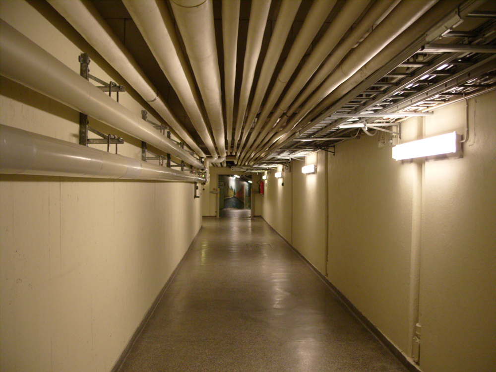 kulvert under sjukhus